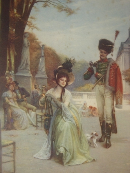 Maitrier, chasseur à cheval, Paris, jardin du Luxembourg, pastel